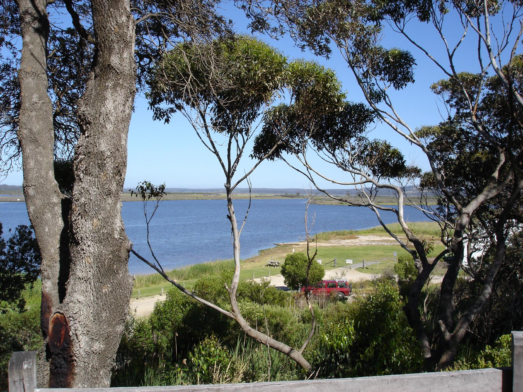 Port Albert